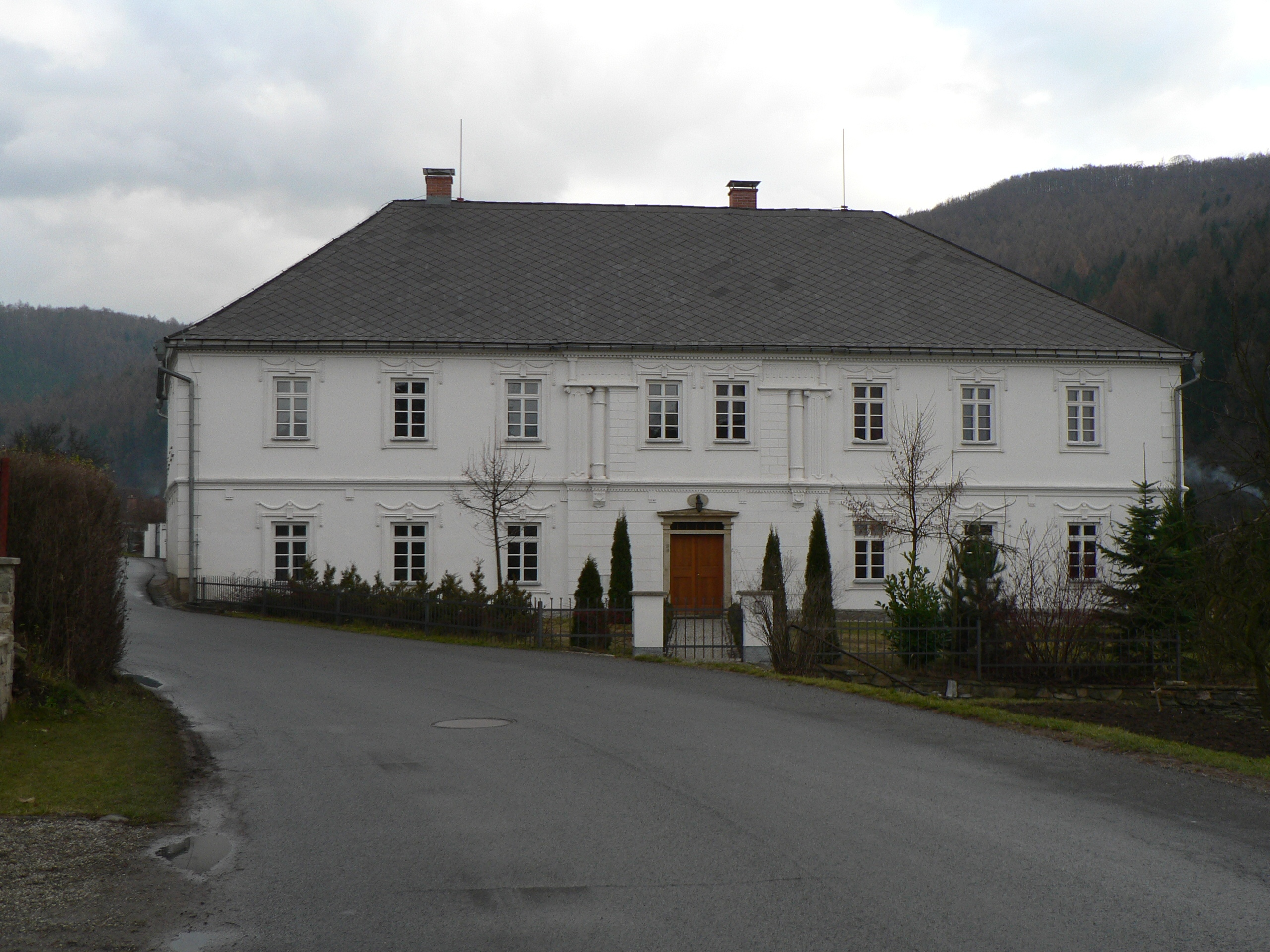 Rychta v Lesnici